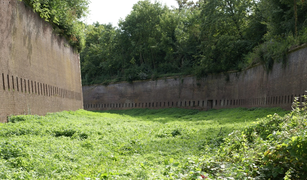 Rijksmonument 28018 - Fort Willem I, Kastanjelaan 50, Maastricht. In de droge gracht geflankeerd door kazematten.